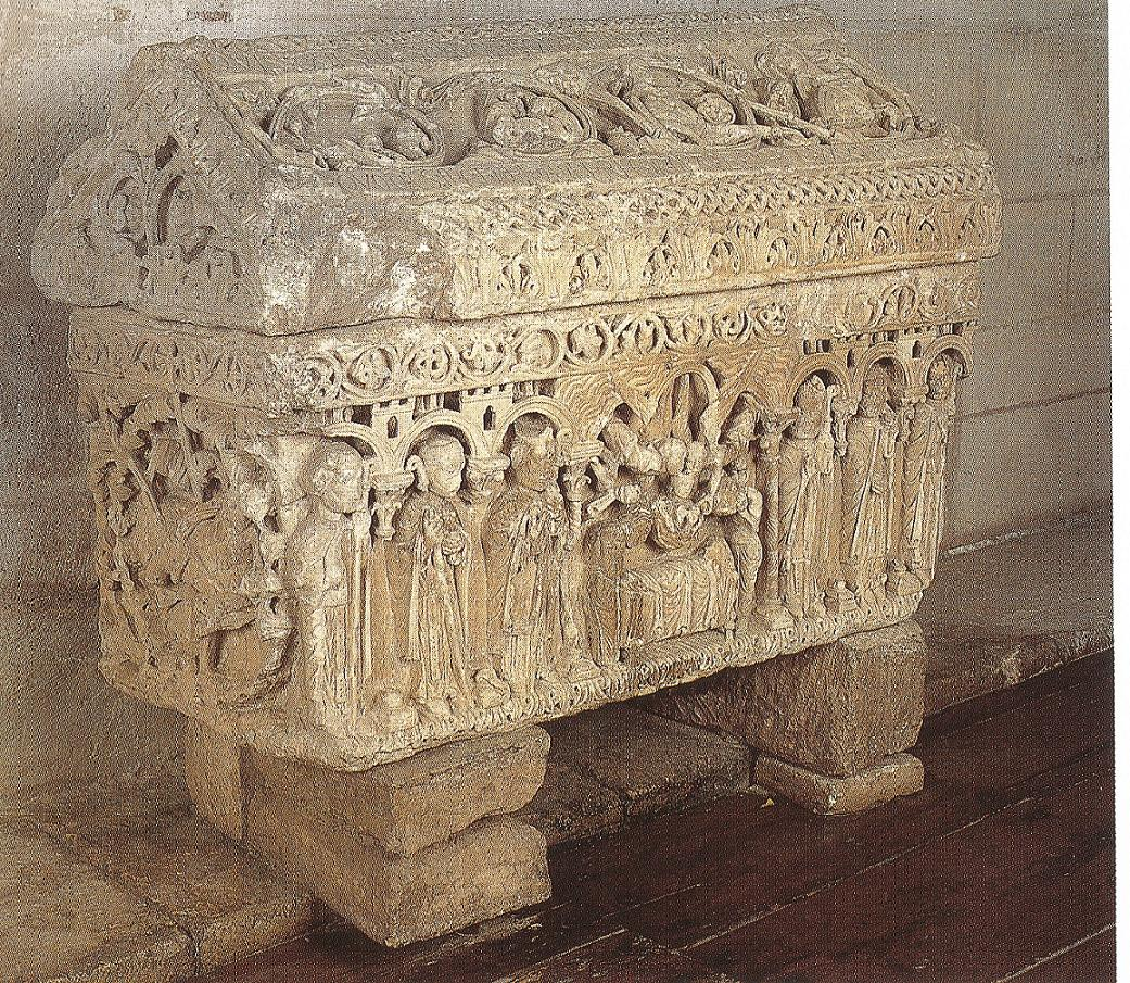 Sepulcro de un hijo de Alfonso VIII, rey de Castilla (Monasterio de las Huelgas de Burgos).